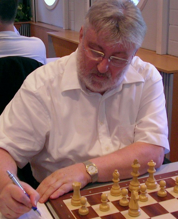 Hans-Walter Schmitt, 2011 bei der Frankfurter Stadtmeisterschaft im Schach.